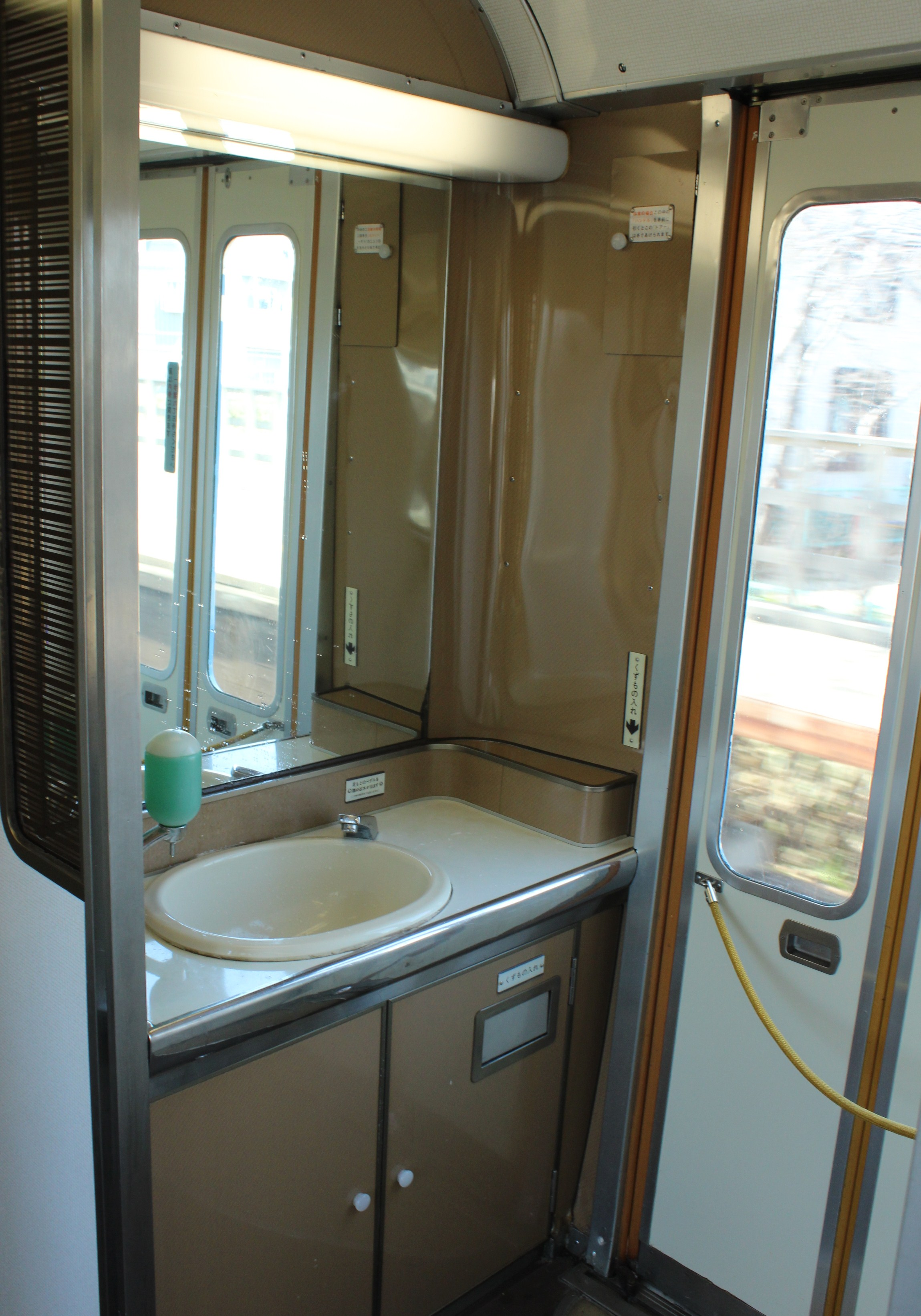 15200系旧式洗面台